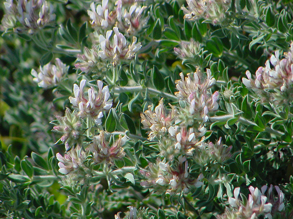 Dorycnium hérissé (Dorycnium hirsutum)